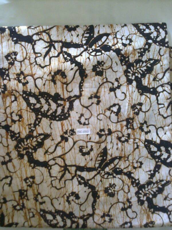 Batik ini menjadi ciri khas dan kebanggaan bagi warga Wonogiri, Jawa Tengah